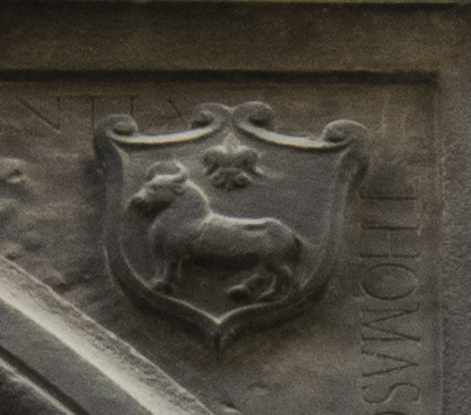 Questo fu lo stemma araldico della famiglia rinascimentale ternana dei Tomassoni: "D'oro con un bue passante partito in palo di rosso e d'argento, sormontato di un fiordaliso d'azzurro" (Fondo Cartari-Febei, registro 167, carta 33 verso, Tomassoni di Terni, Memor. di Ter. M.S. (Archivio di Stato di Roma)